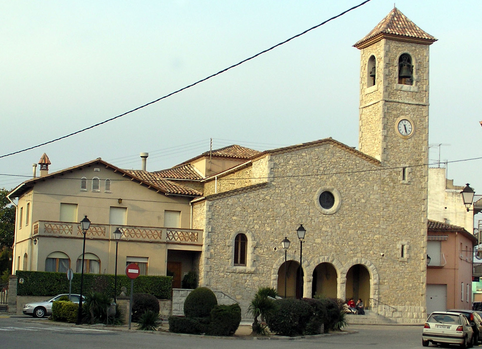 Balenya, hostalets, village in Catalonia, Spain